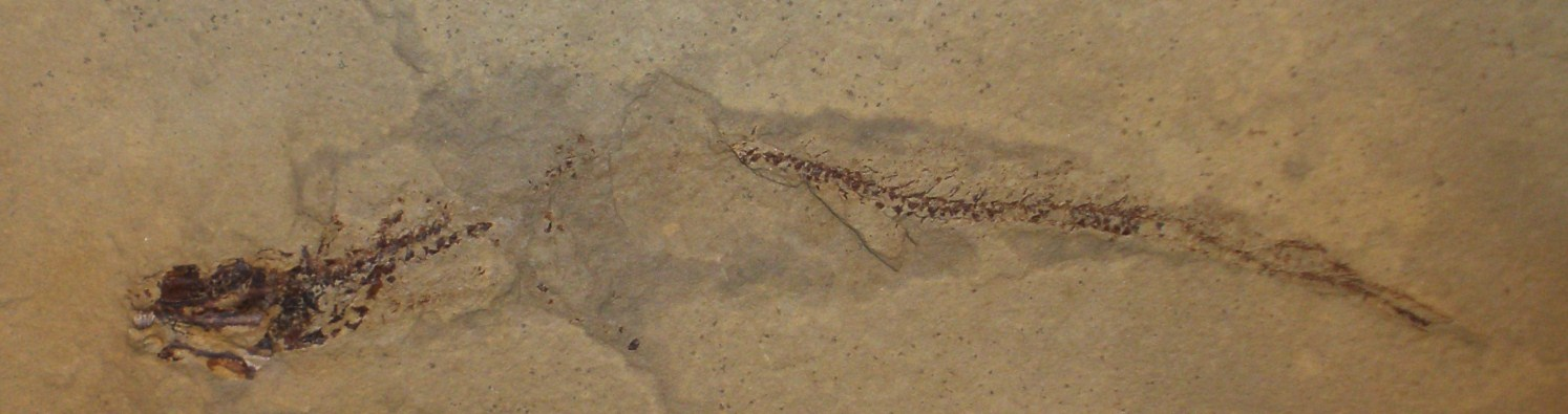 Fossil of Harpagofututor, an extinct fish- Took the photo at Fossil Show, Munchen 2011